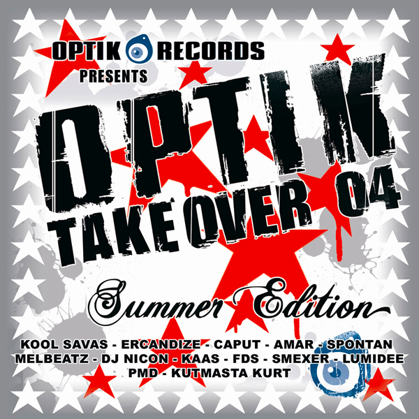 Cover des Samplers „Optik Takeover 2004 - Sommer Edition“